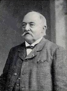 Der belgische Komponist und Dirigent Louis Canivez (1837-1911), gelegentlich auch Louis Canivet geschrieben.